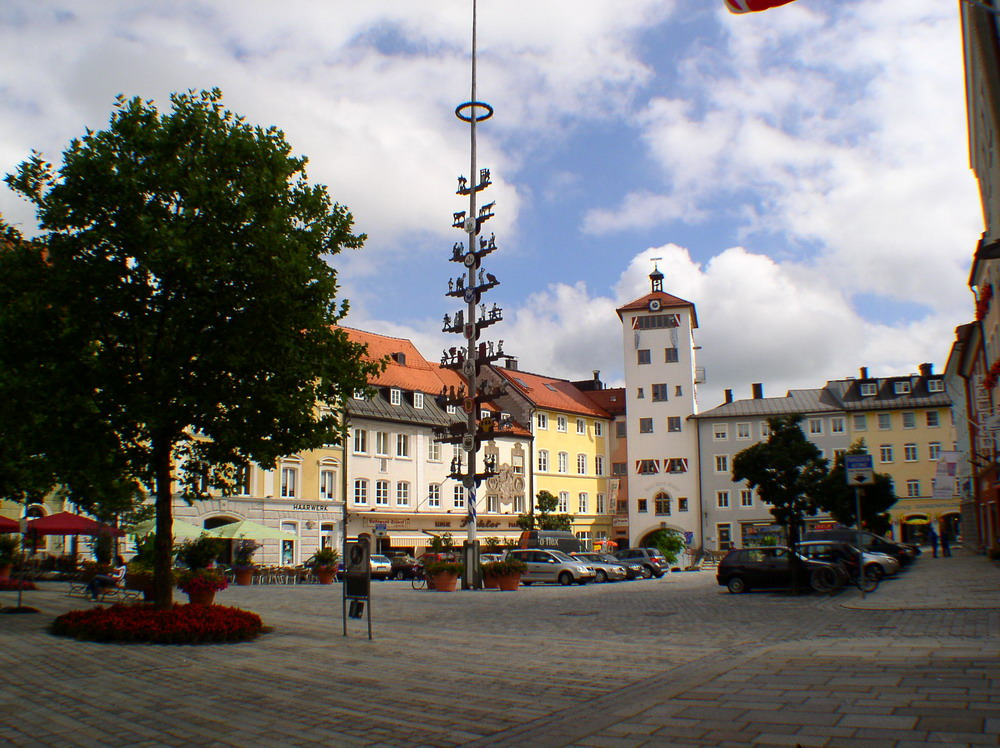 Stadtplatz Traunstein